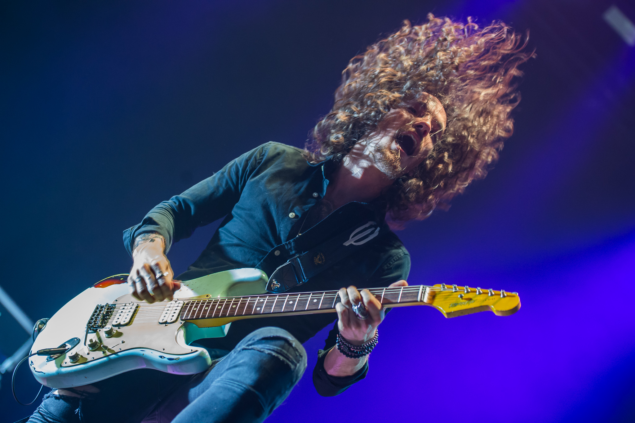 ARGO-Konzerte,Konzert,Livekonzert,Livemusik,Musik,Oli Brown,Raveneye,RiP,Rock im Park 2017